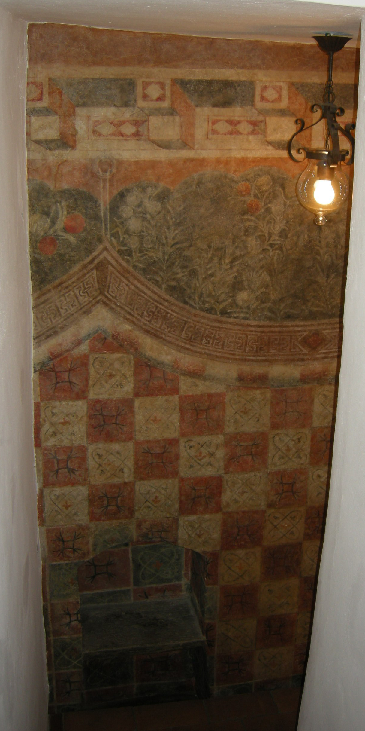 Torre dei lanfredini, affreschi